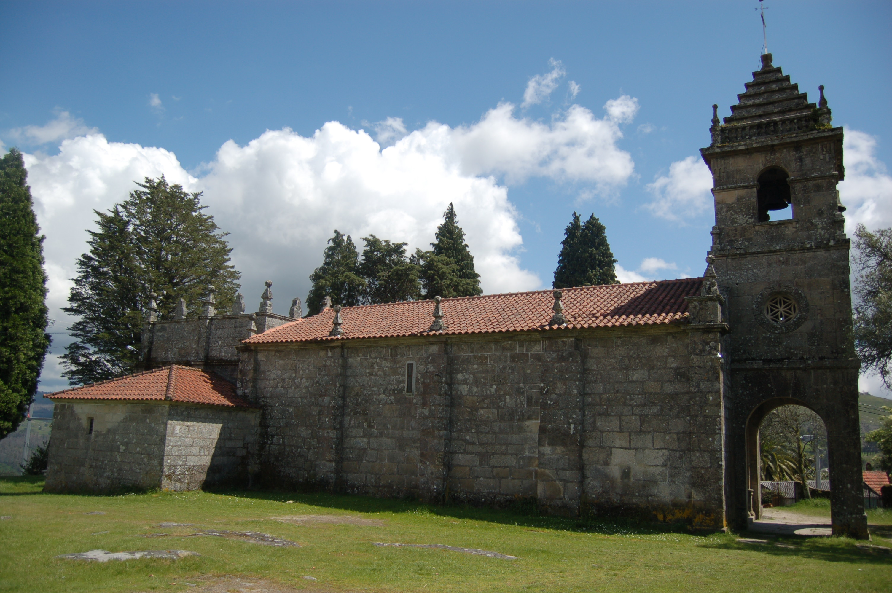 Igrexa parroquial de San Martiño de Xustáns (Ponte Caldelas)